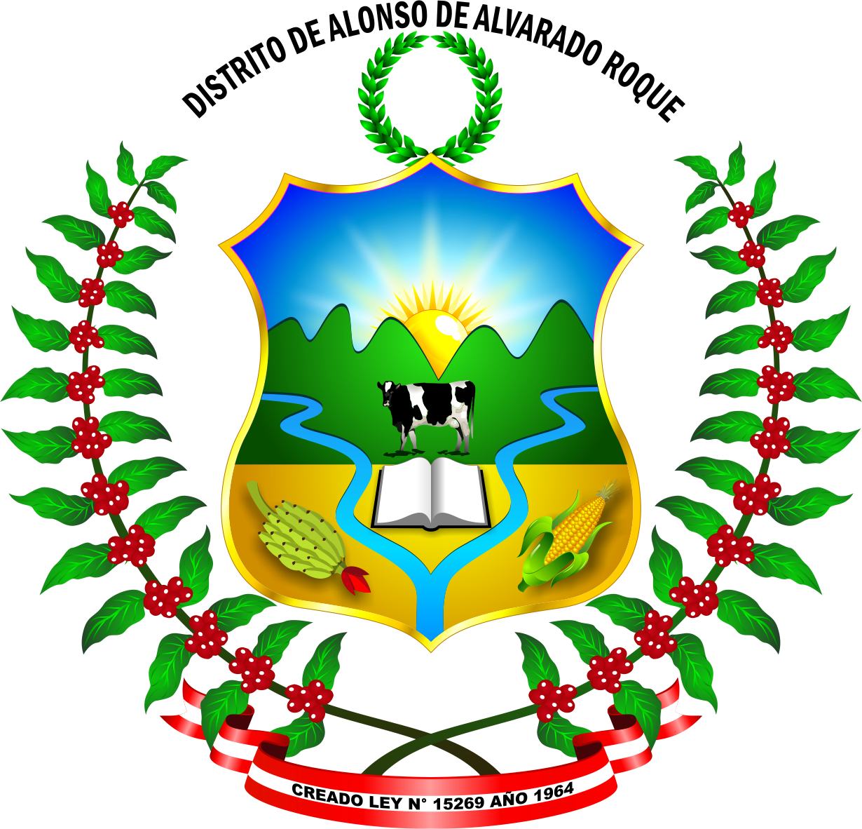 Distrito de Alonso de Alvarado - Provincia de Lamas - Región San Martín